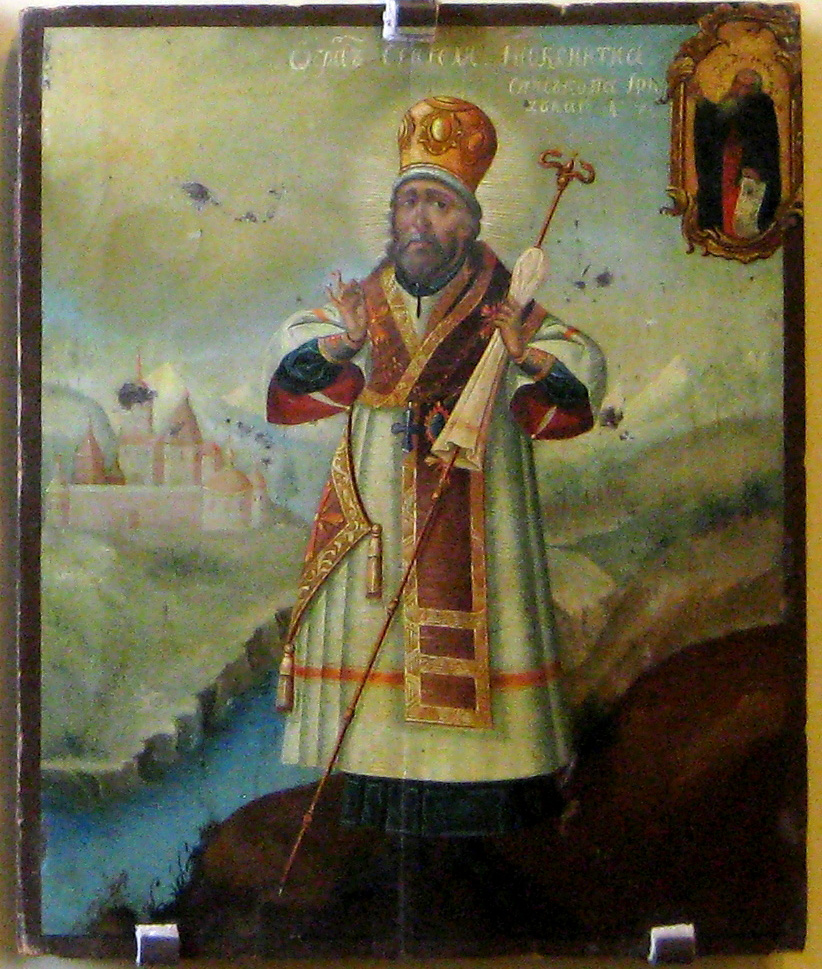 Святитель Иннокентий, епископ Иркутский (Иркутск, начало 19 века. Оклад 1808 года)